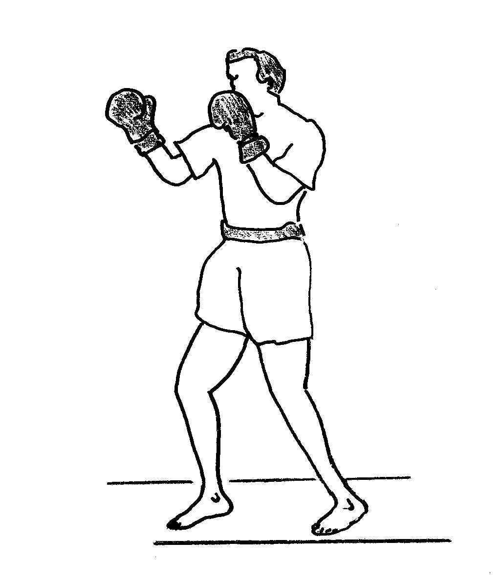 attitude_droite1.jpg